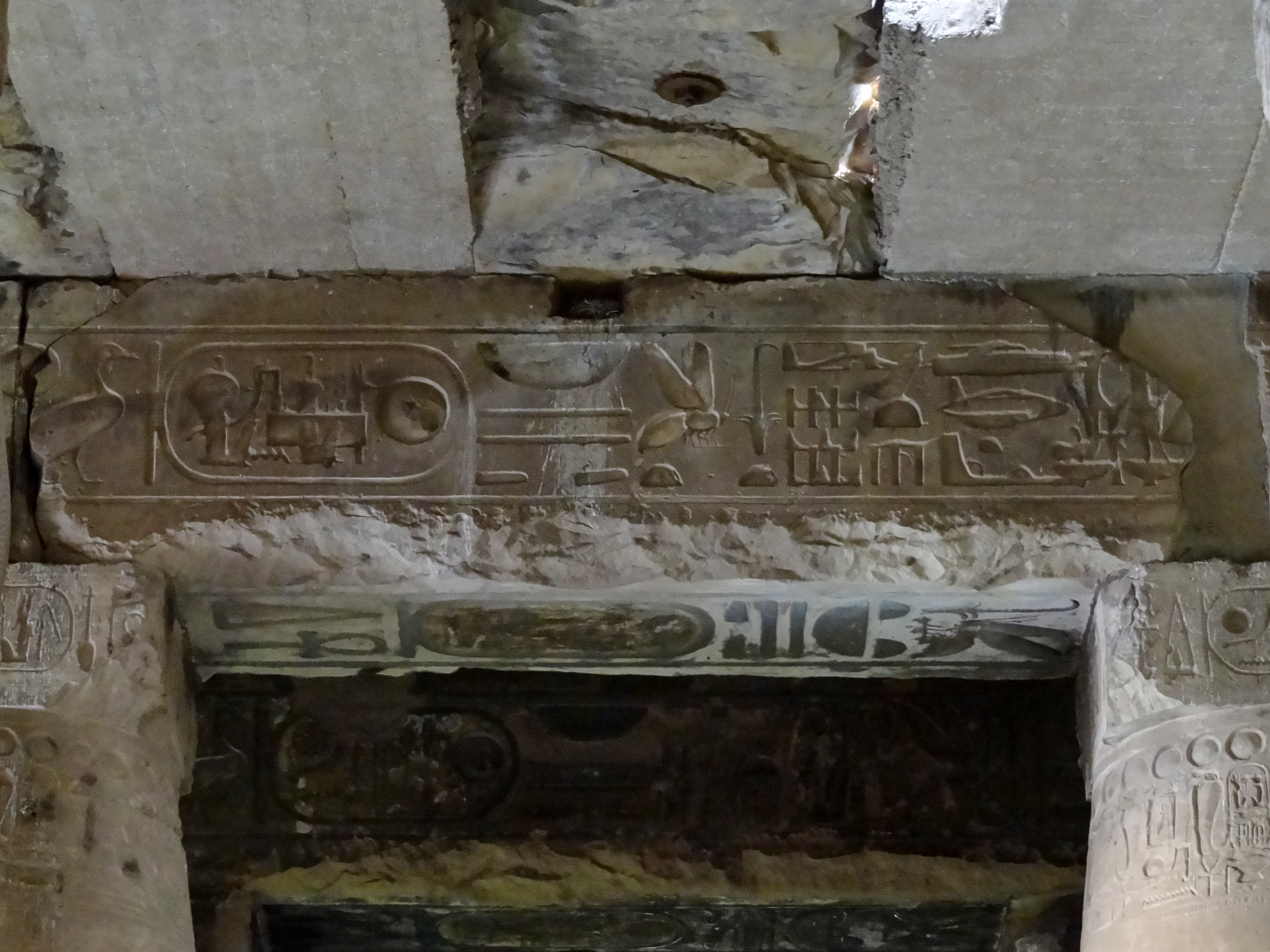 Architrav mit Hieroglyphen hinter dem Eingang zum Totentempel des Sethos I. von Abydos, Ägypten